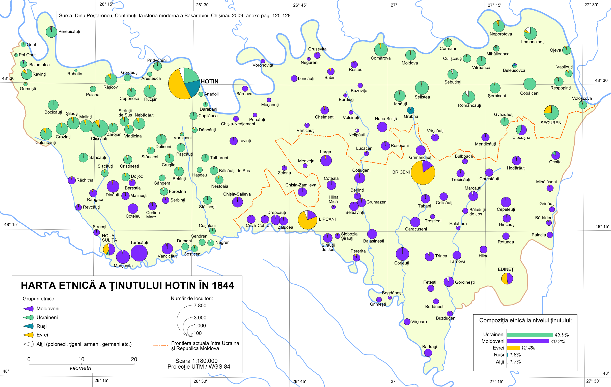 Harta etnica a tinutului Hotin in 1844. Sursa: Dinu Poştarencu, Contributii la istoria moderna a Basarabiei, Chisinau 2009, anexe p. 125-128.